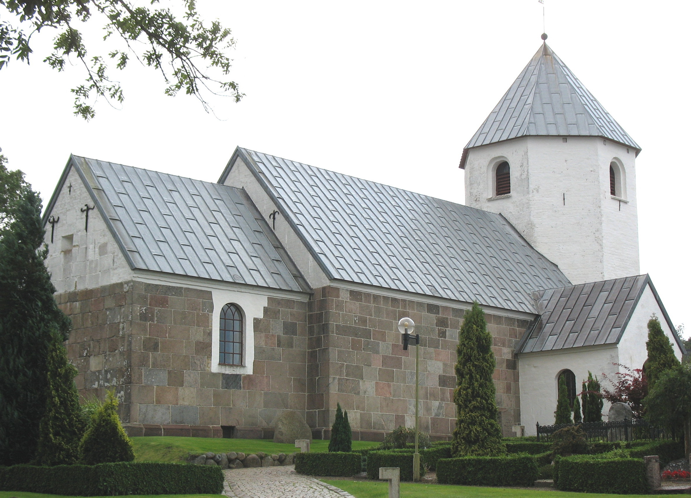 Sønder Kongerslev Kirke